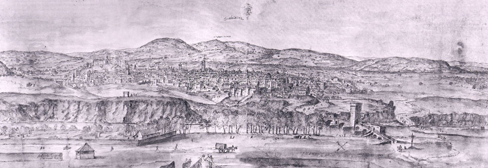 Dibujo de una vista general de Guadalajara, realizado por Anthonis van den Wijngaerde en 1565.